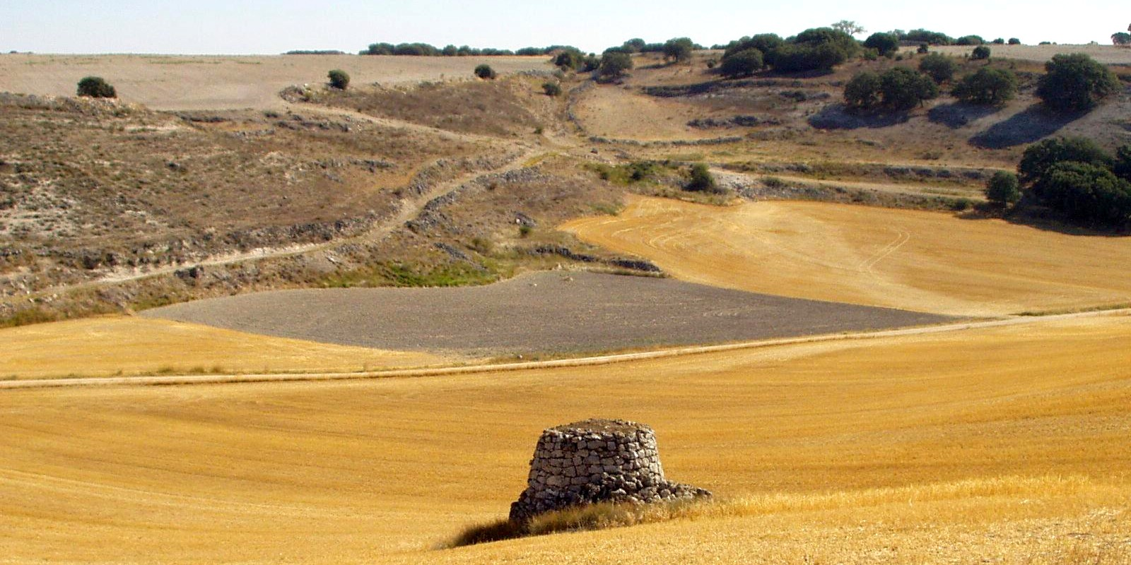 Corrales de Duero. San Llorente. Valladolid. Choza en San Bartolomé. Fuente de San Bartolomé. Las Mangadas y Monte de San Llorente. Arroyo Congosto.